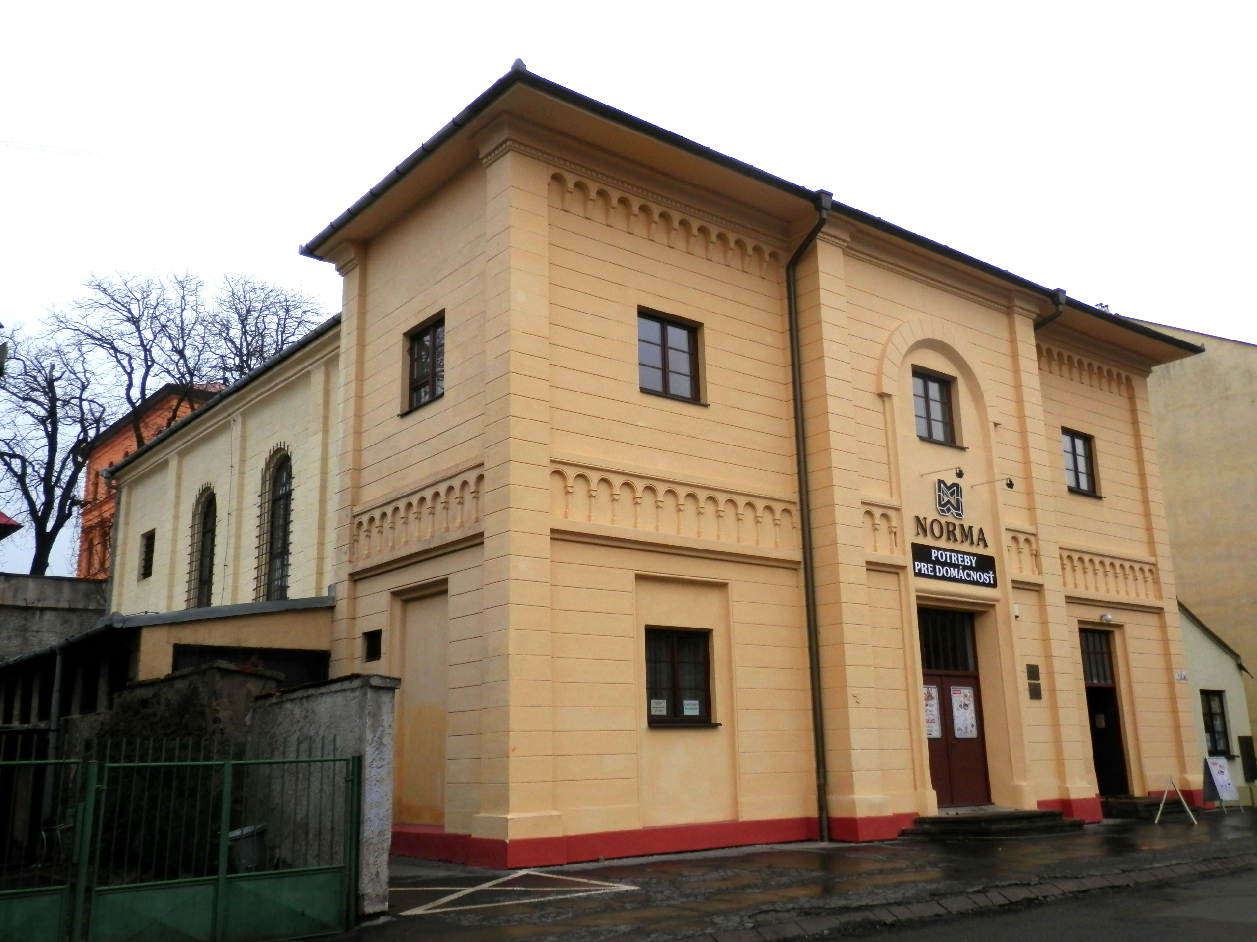 Židovská neologická synagóga. Mesto Prešov.